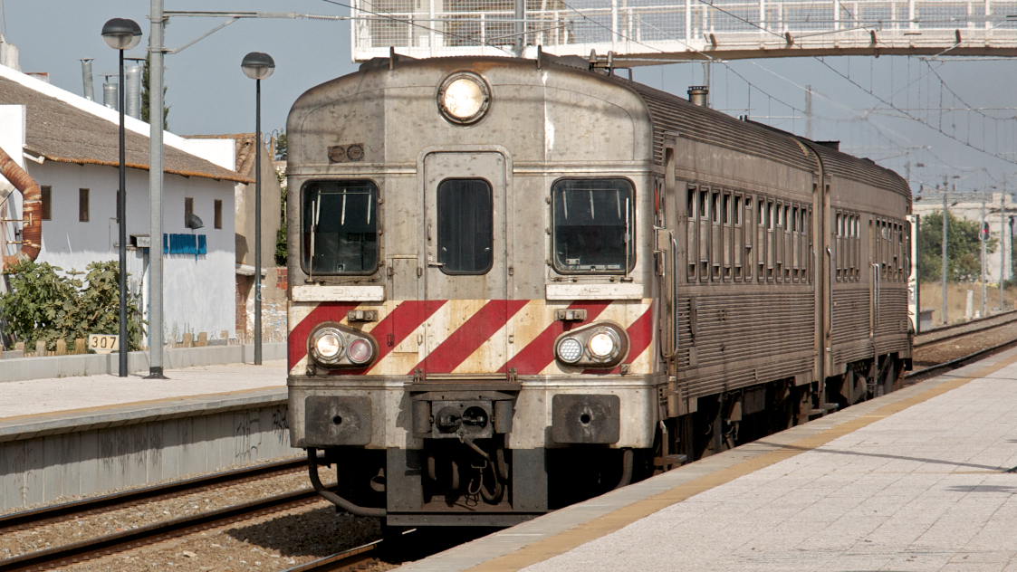 Tipo: Comboio Regional 5910 [Faro - Lagos] Local: Ferreiras [Linha do Algarve, PK 307] Data e hora: 2 de Julho de 2011 [18h10] Material: Automotora 0619 [Unidade Dupla Diesel]